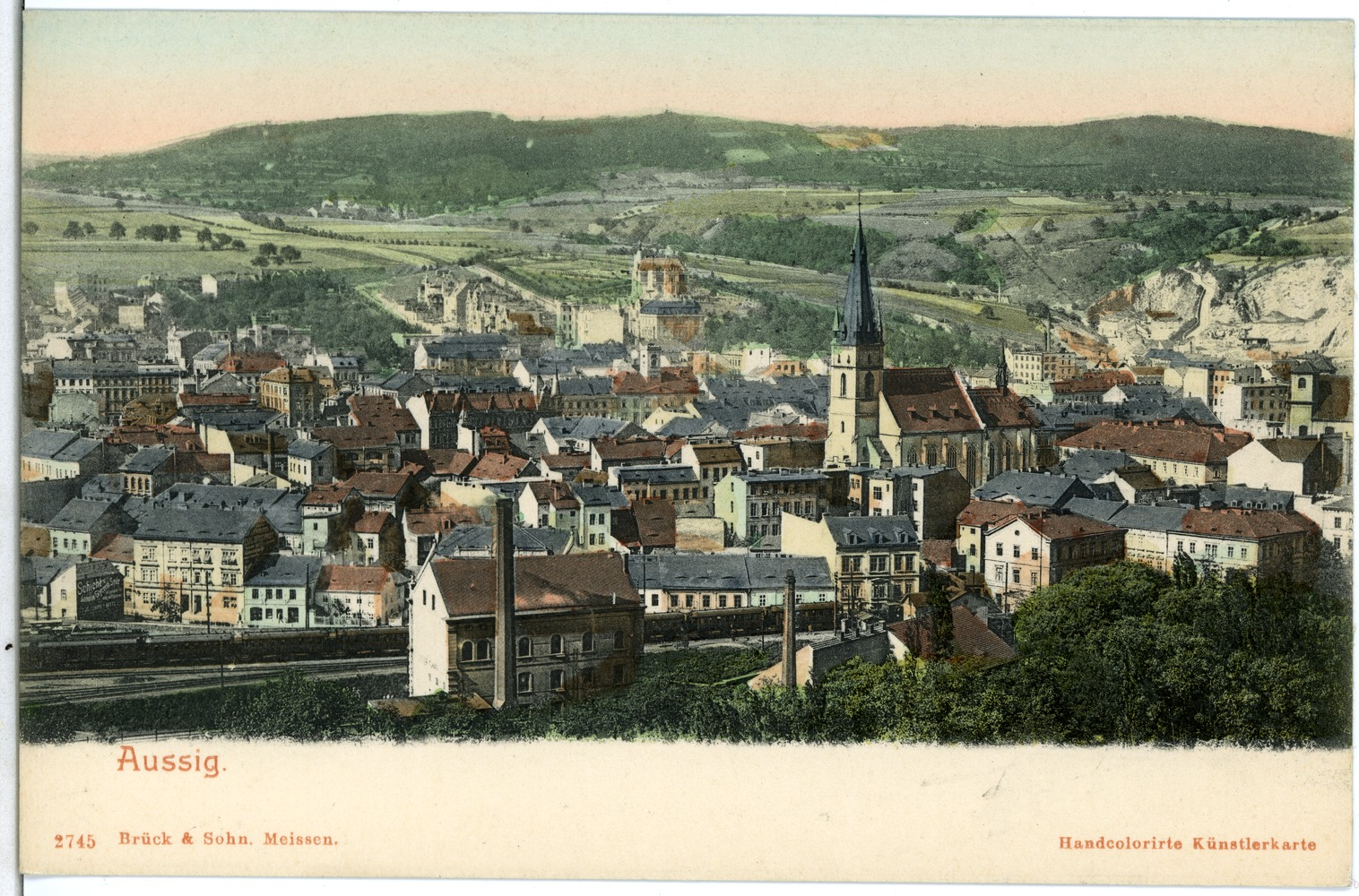 Aussig/Elbe; Blick auf die Stadt Diese Ansichtskarte stammt vom Kunstverlag Brück & Sohn aus Meißen ( Die Karte hat die eindeutige Nummer 02745 und ist in höherer Auflösung beim Verlag erhältlich. Sie wurde im Rahmen einer Kooperation zwischen Wikipedianern und dem Kunstverlag für Wikimedia Commons zur Verfügung gestellt.